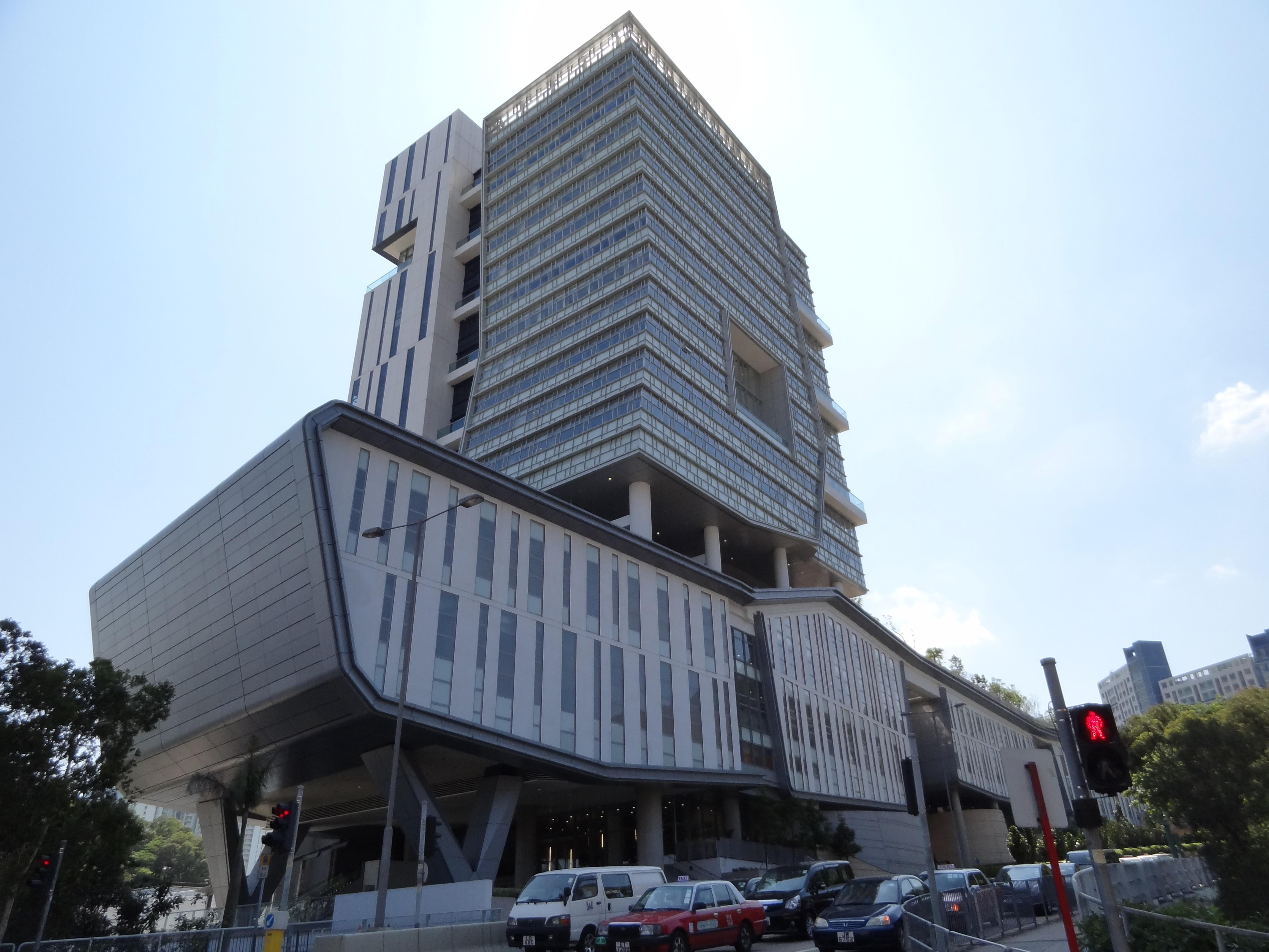 홍콩 시립대학교 Academic 3